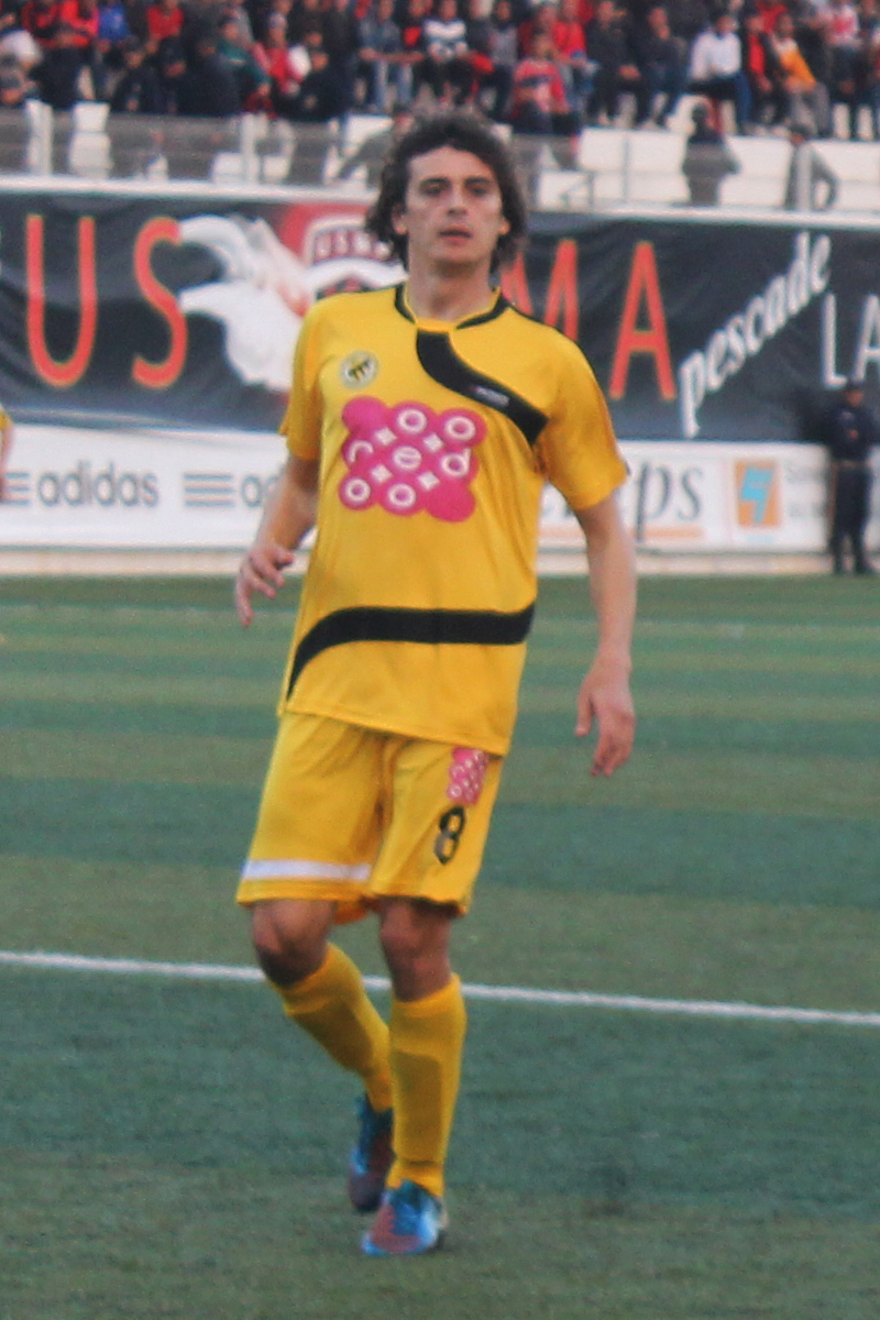 Karim Hendou sous le maillot de l'USM El Harrach, lors du match contre l'USM Alger au stade Omar-Hamadi, pour le compte de la 19e journée de Ligue 1 Mobilis 2013-2014. →This file has been extracted from another file: 2014-02-15 - USMA-USMH - 6101.jpg